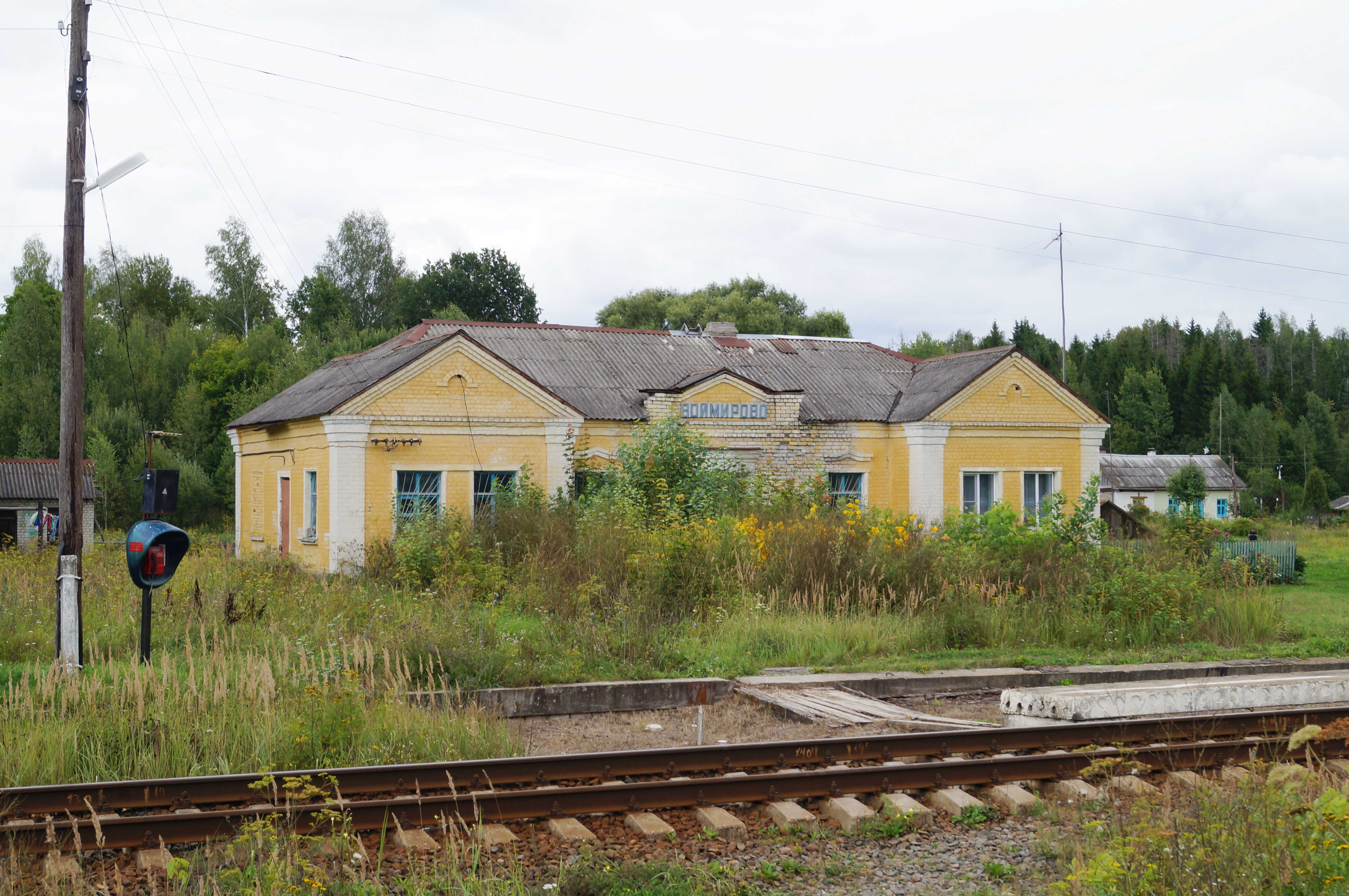 Ст. Воймирово